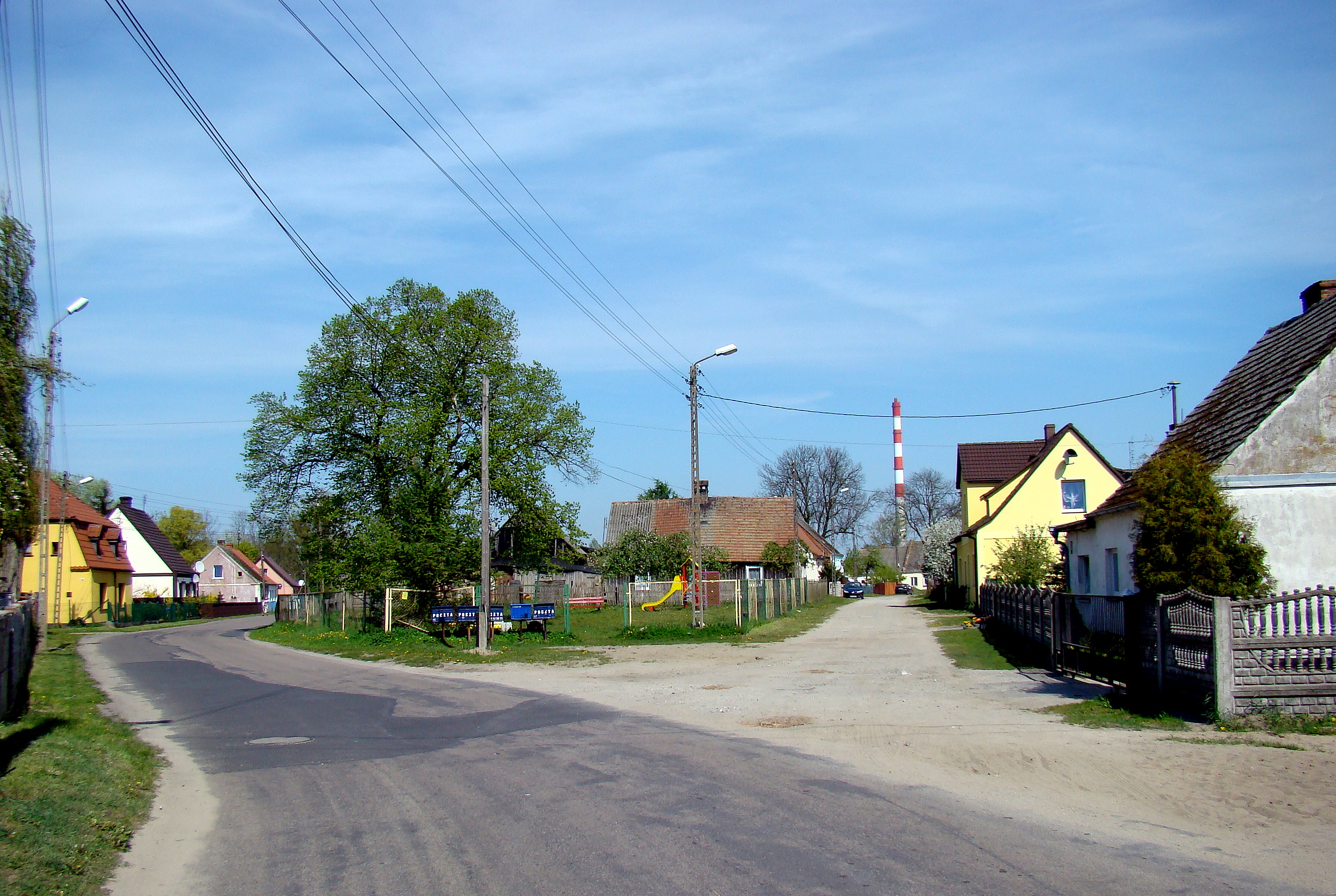 Tatynia, (Gmina Police, Powiat policki, Województwo zachodniopomorskie), Polska